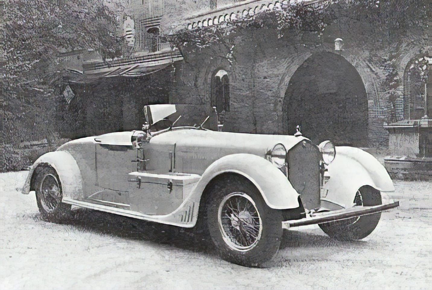 Alfa Romeo 6C 1750 del carrozziere torinese Garavini